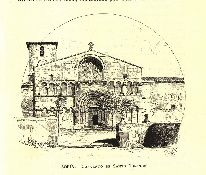 Soria. Convento de Santo Domingo.